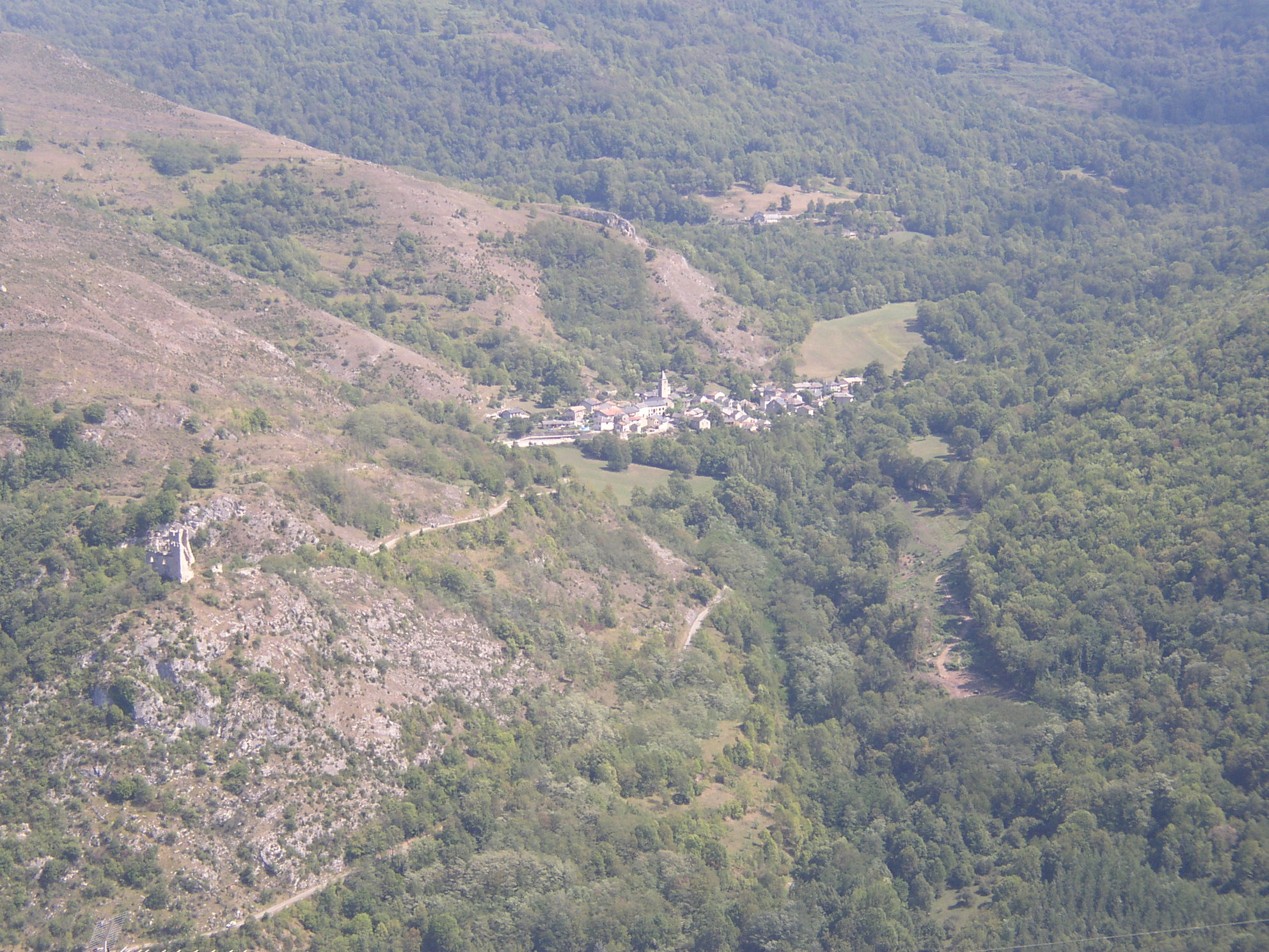 vue du village d'Arquizat (commune de Miglos) depuis Lapège Auteur Daniel Duron Et caetera Licence gfdl